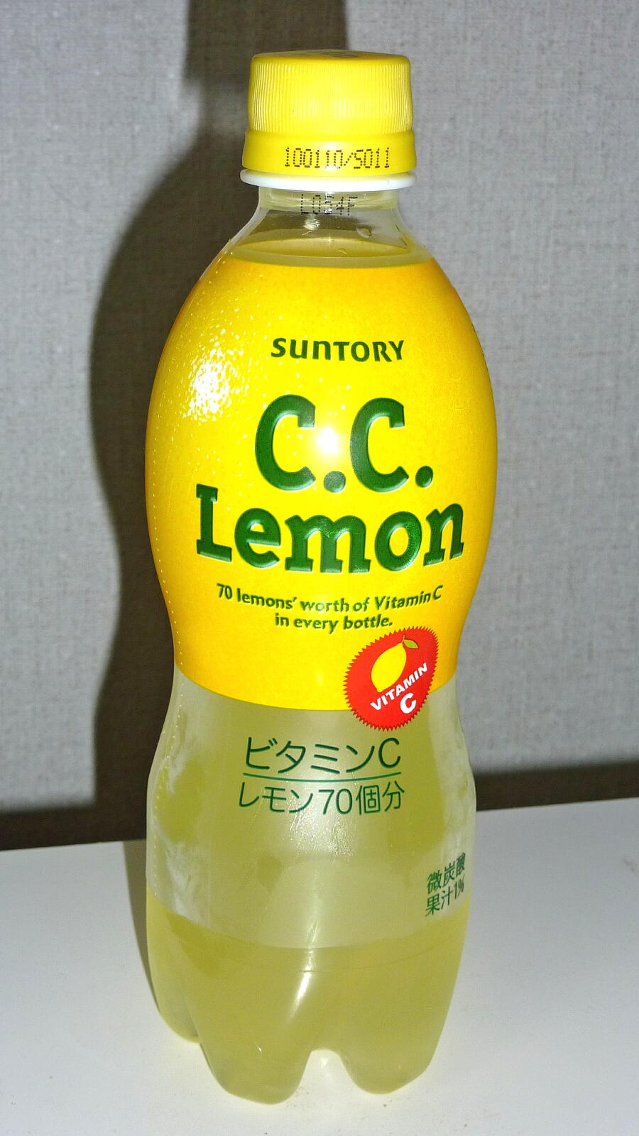 C.C.レモン